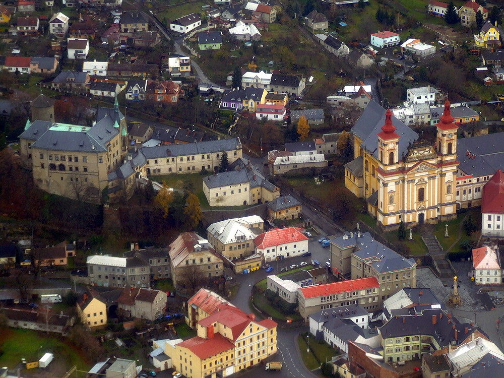 Šternberk, letecký pohled